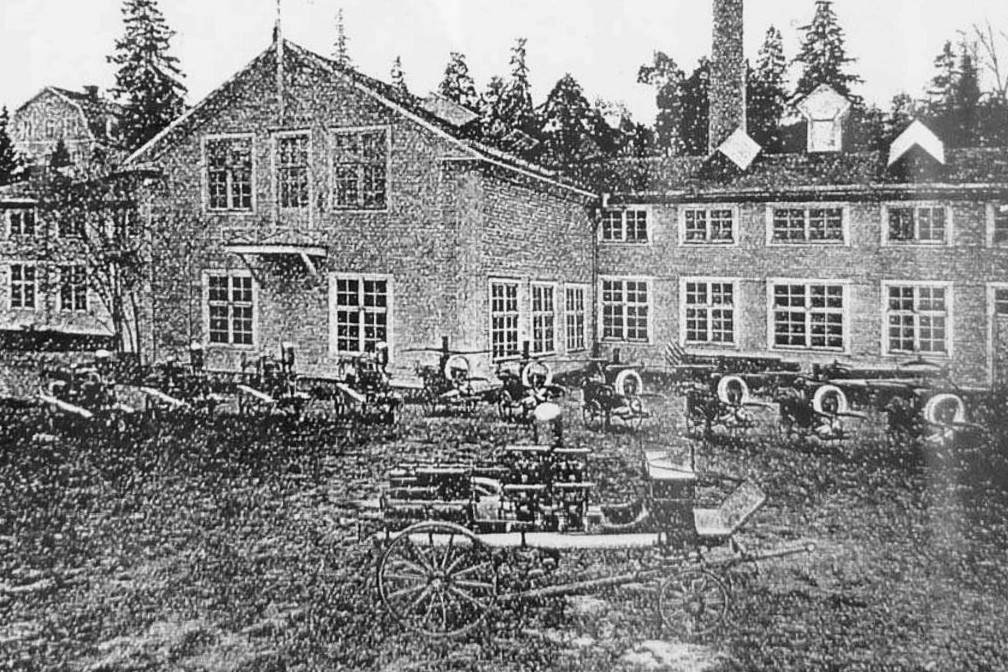 Henrikssons sprutfabrik i Henriksbergs industriområde